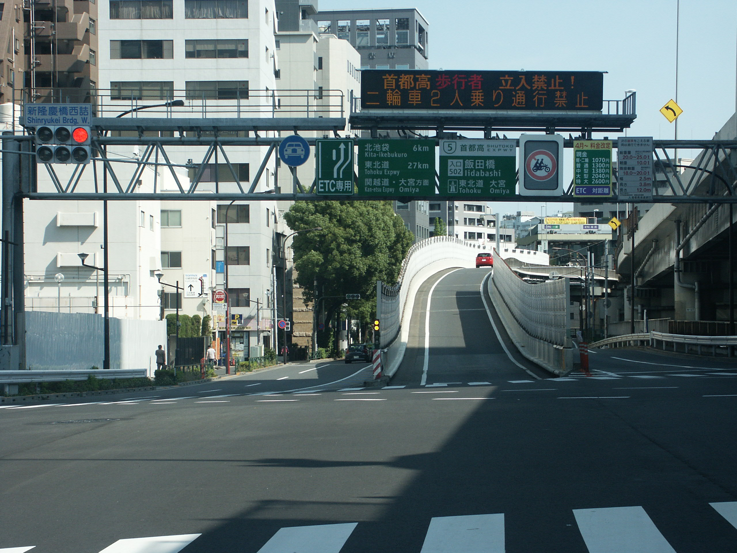 首都高速道路5号池袋線飯田橋入口付近